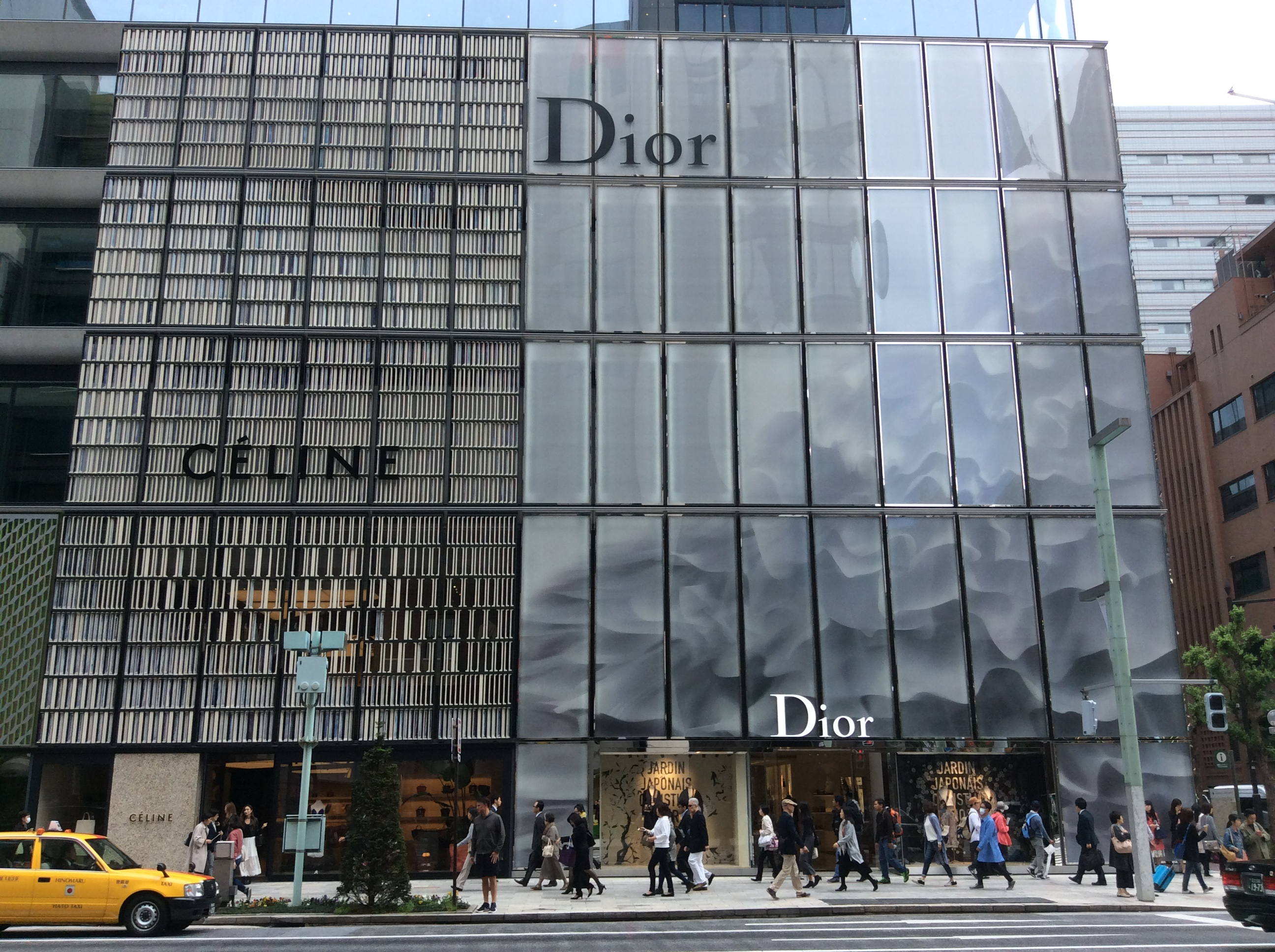 GINZA SIX